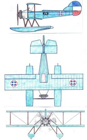 Арно HD-41H/Hanriot HD.41H